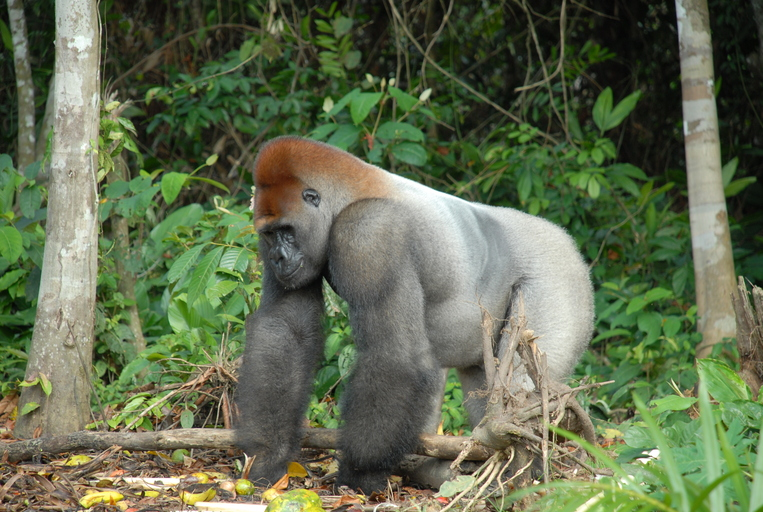 Gorilla gorilla gorilla, Congo